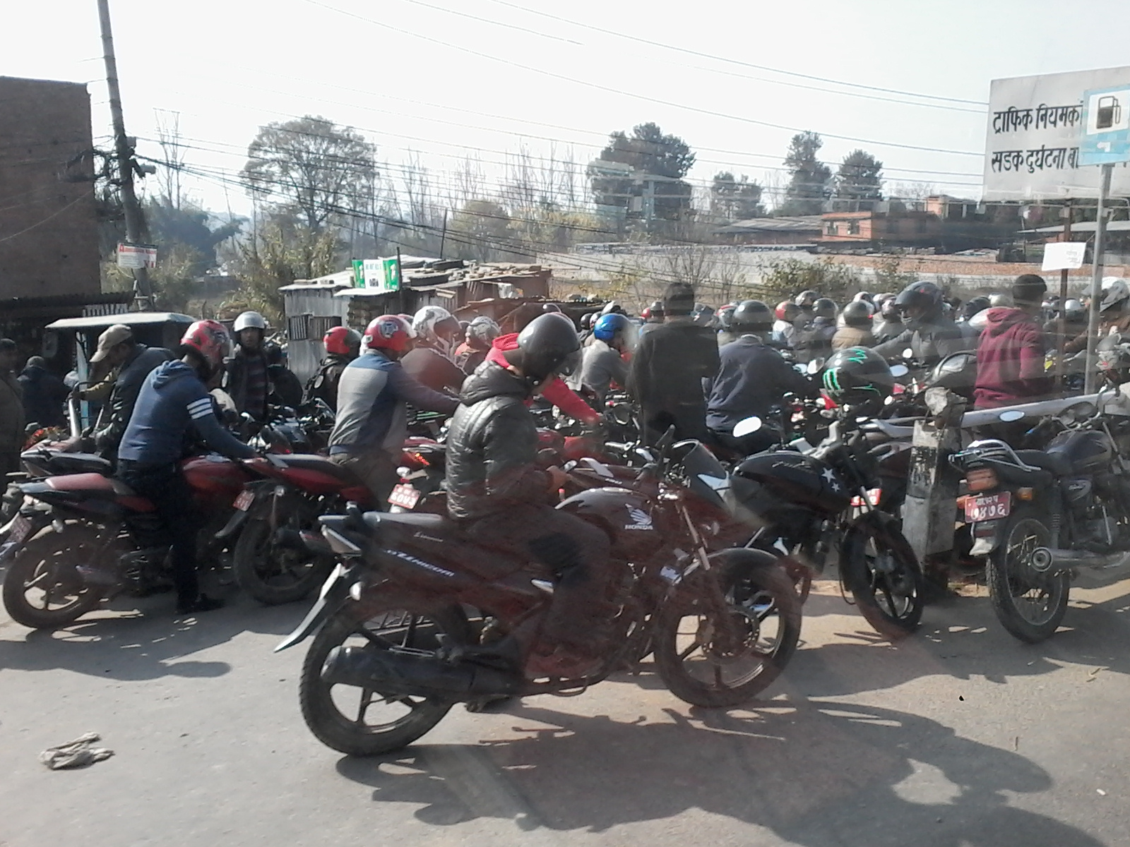 नेपाली: नेपालमा नाका बन्दीको असर